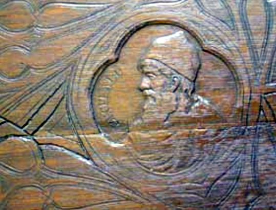 Decebal - Efigie sculptată pe blatul mesei cu care Theodor Aman a câștigat Medalia de clasa a II-a a Expoziției artiștilor în viață din anul 1870 - Muzeul Theodor Aman din București